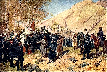 Capture Of Shamil (Пленение Шамиля.), Roubaud F. (Рубо Ф.А.) 1886. Чечено-Ингушский республиканский музей изобразительных искусств Capture of Imam Shamil by Russian troops in 1859 during the Caucasus War